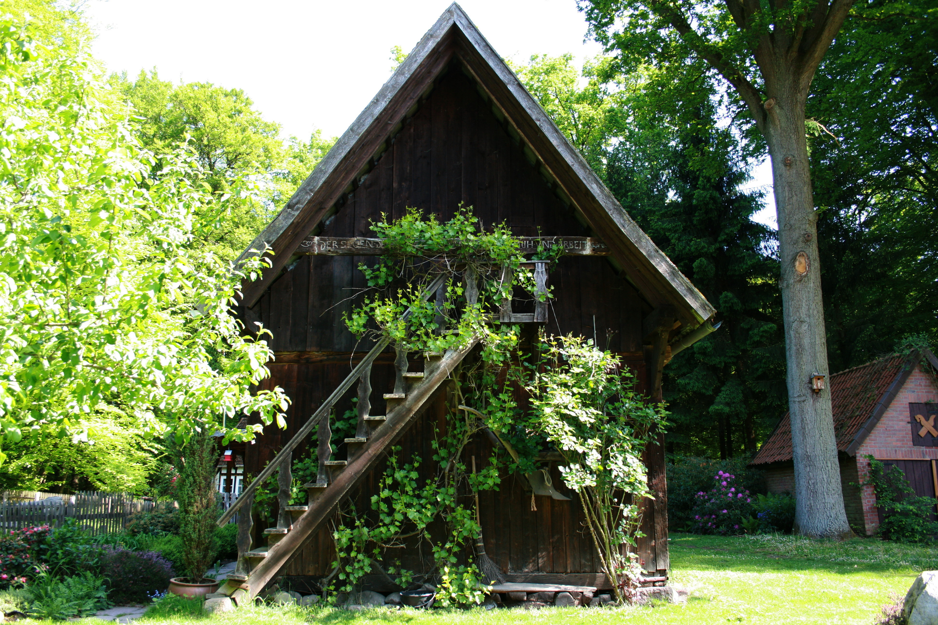 Hof Limbeck, Gilmerdingen in Neuenkirchen (Lüneburger Heide): Honighaus, zum gemütlichen Ferienhaus umgebauter Treppenspeicher von 1705